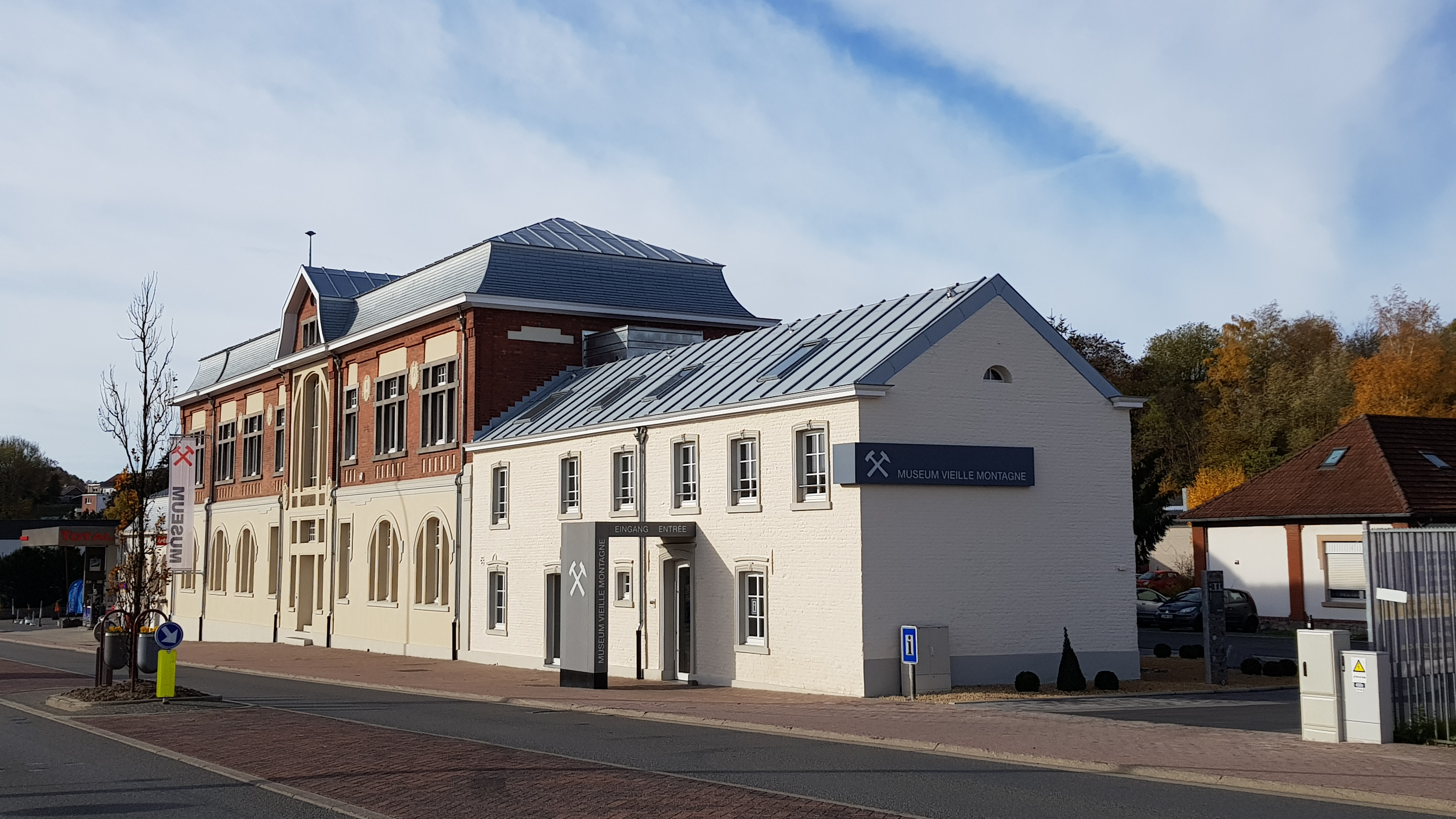 Direktionsgebäudes der Société anonyme des Mines et Fonderies de Zinc de la Vieille Montagne, Kelmis, Belgien This photo of immovable heritage has been taken in the Walloon Region